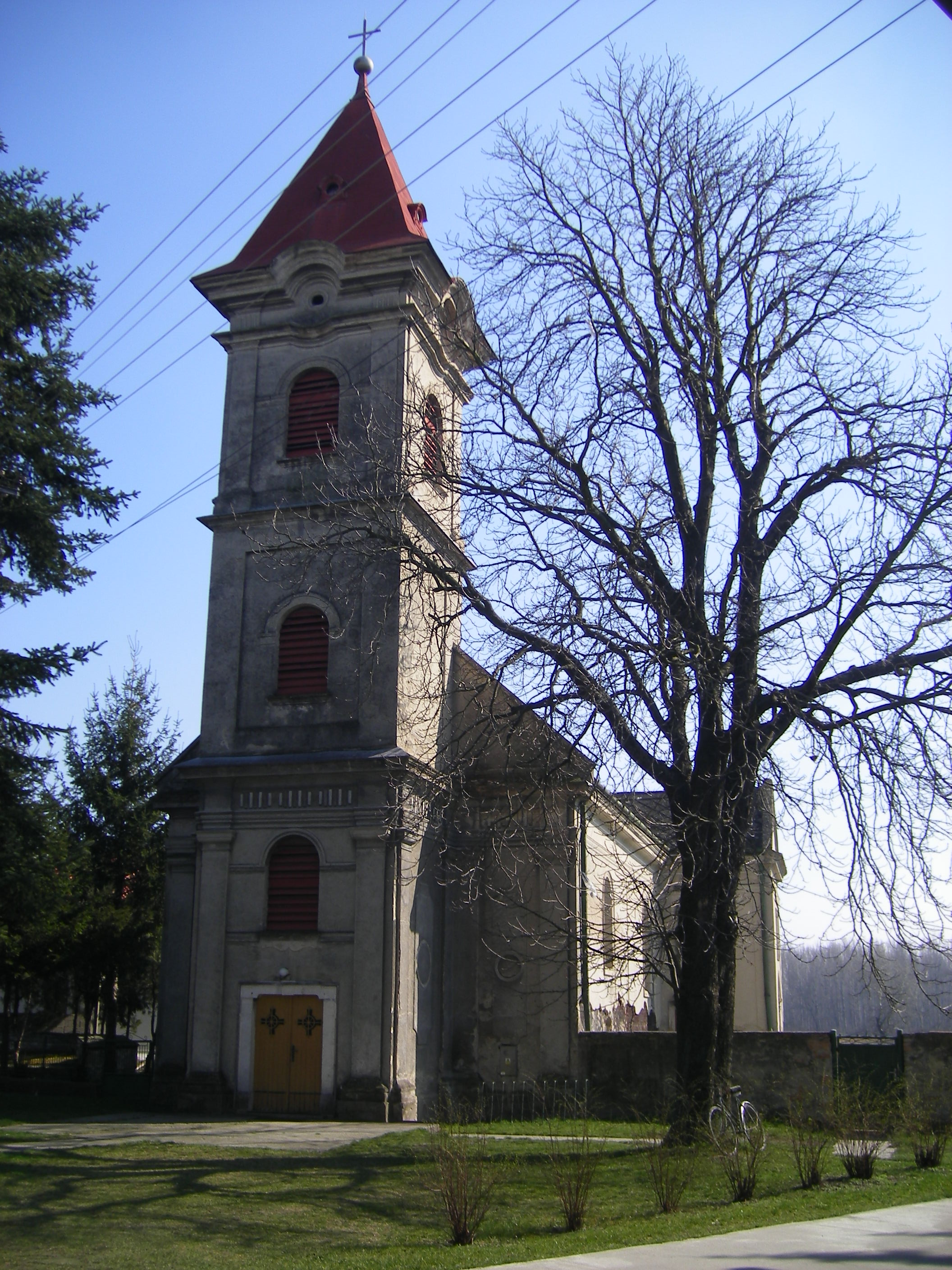 Komáromfüss, katolikus templom